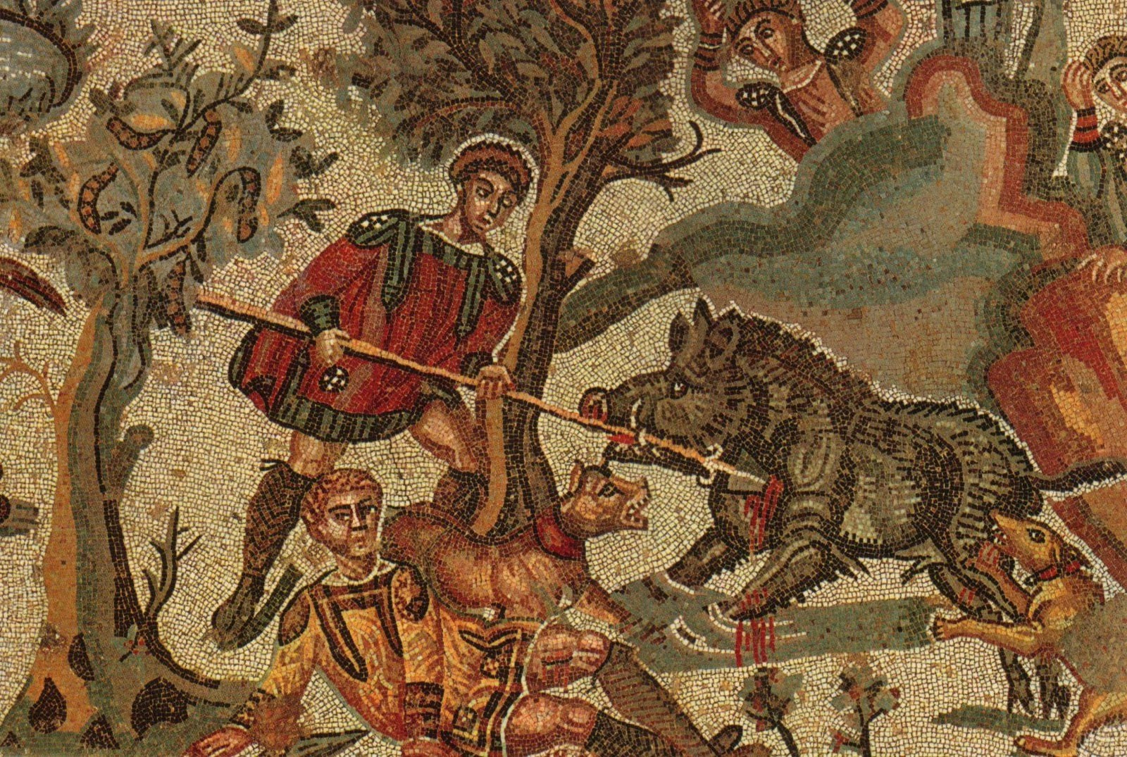 Mosaici Piazza Armerina